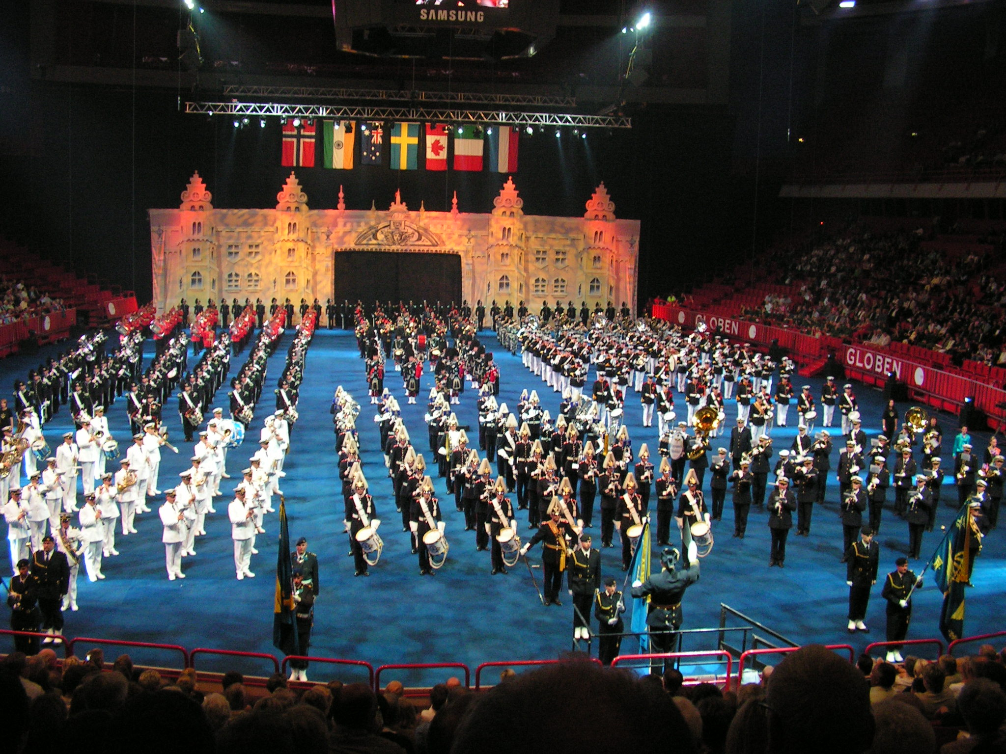 Alla medverkande musikkårer vid Swedish Military Tattoo i Globen, Stockholm.